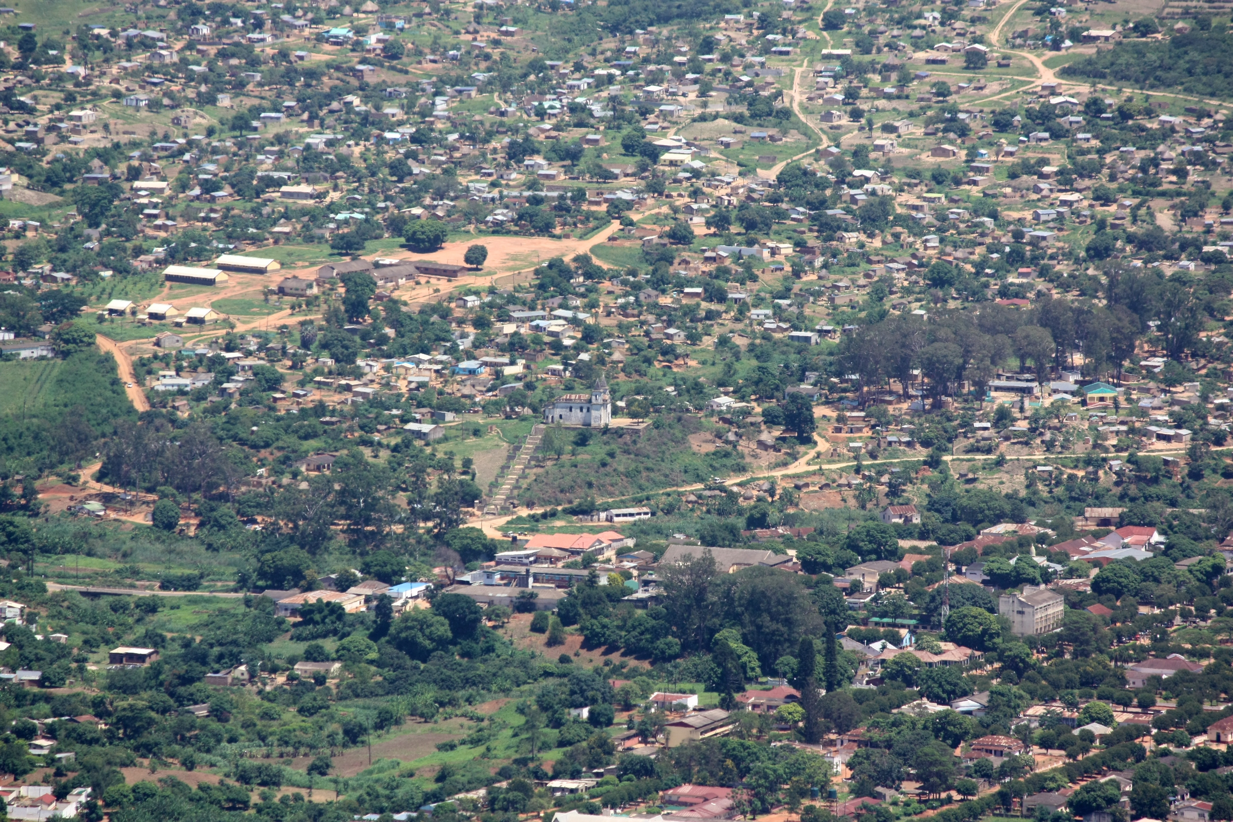 Manica Centro da Cidade / old Church